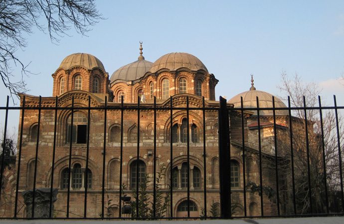 Pammakaristos Church